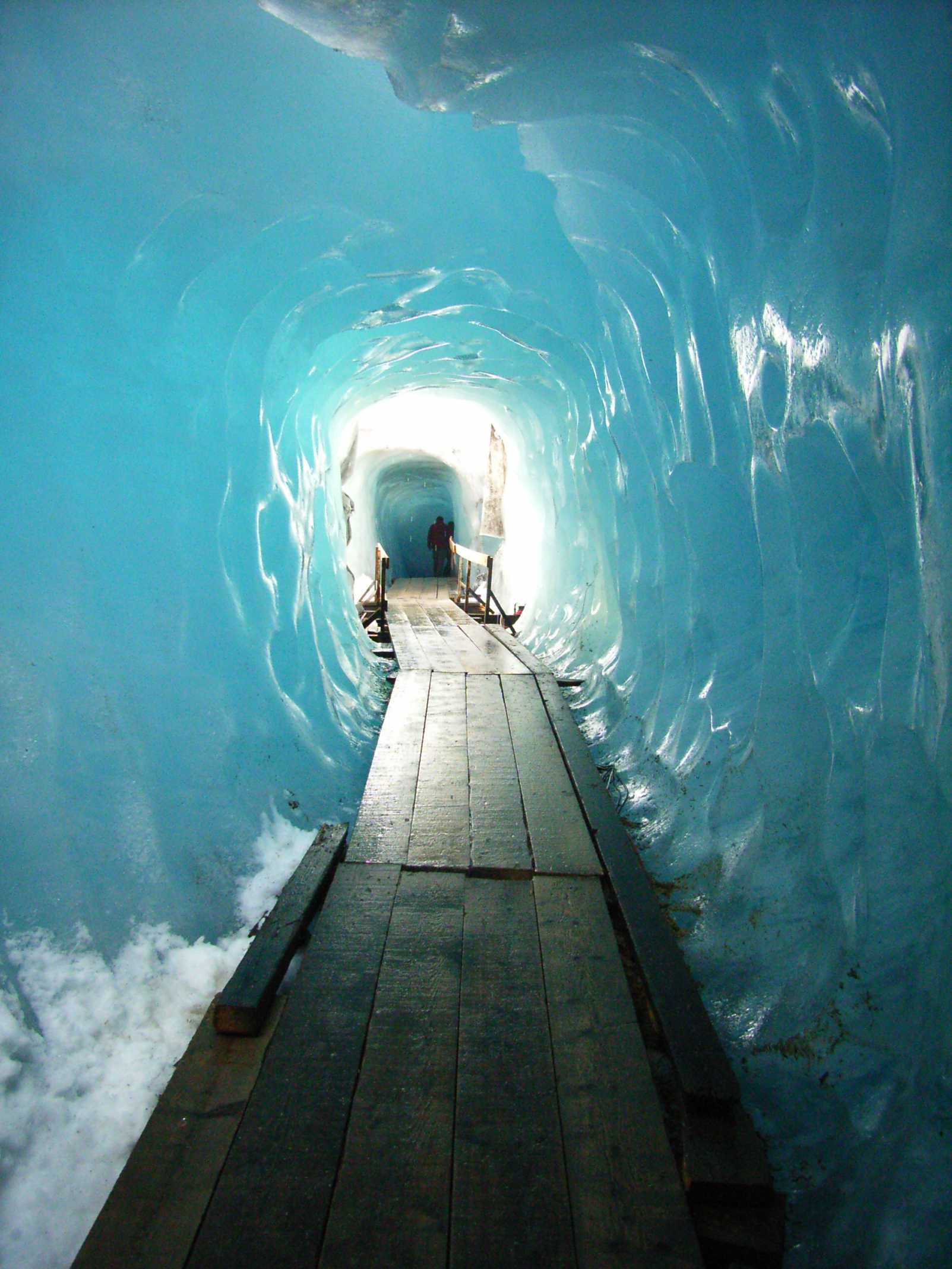 Im Inneren des Rhônegletschers